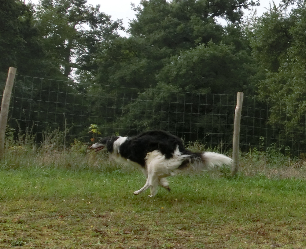 chien barzoï mâle photographié en 2013